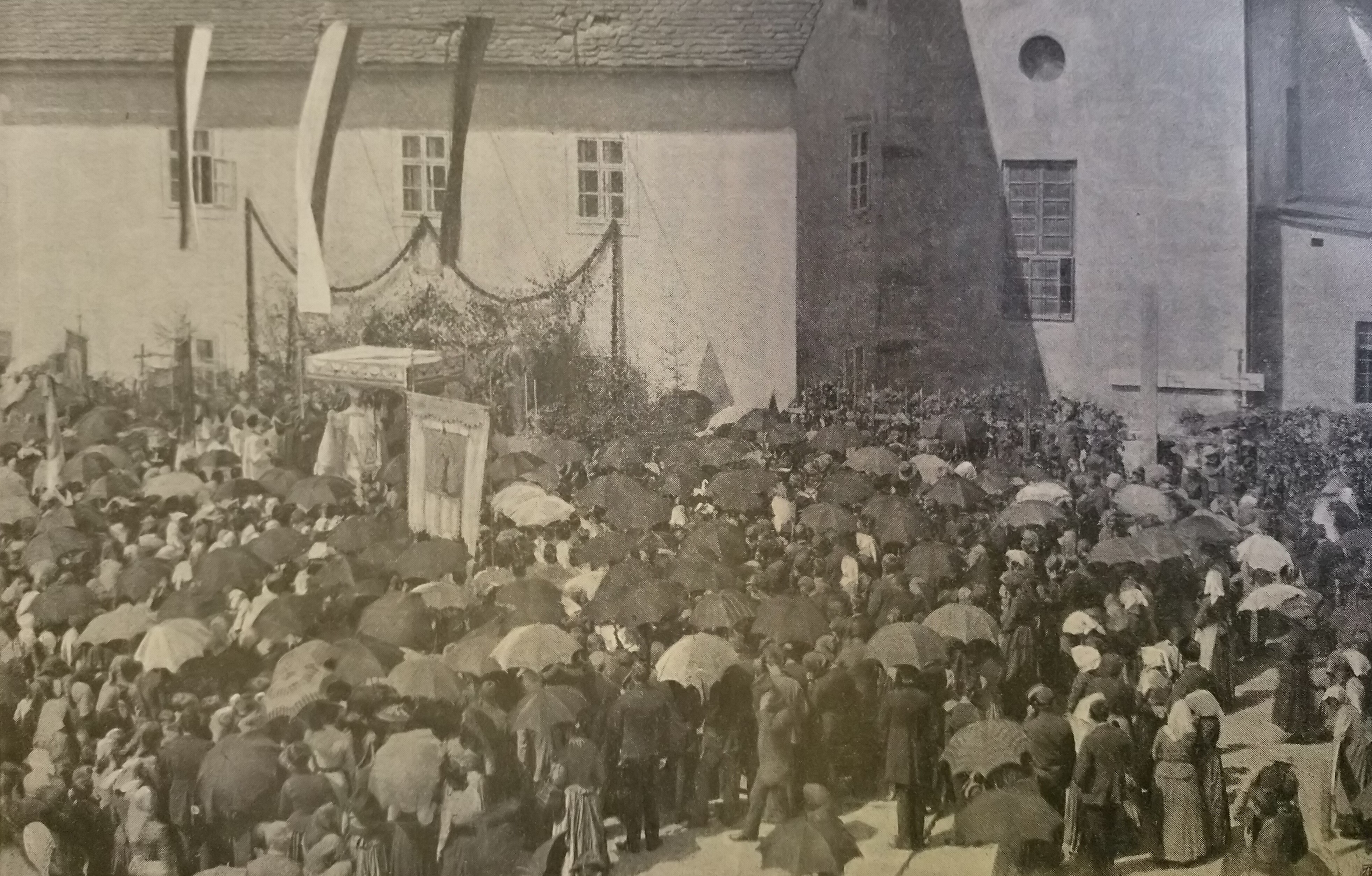 Položitev temeljnega kamna za frančiškansko cerkev v Mariboru